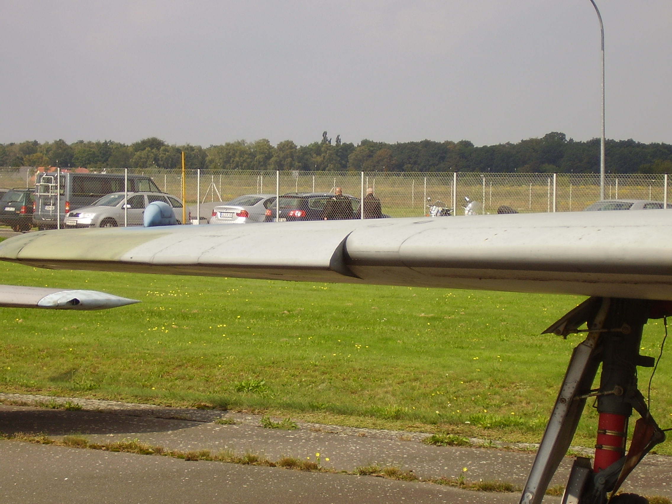 Luftwaffenmuseum der Bundeswehr; Airforce Museum of the Bundeswehr; Berlin-Gatow, F.Mk.6